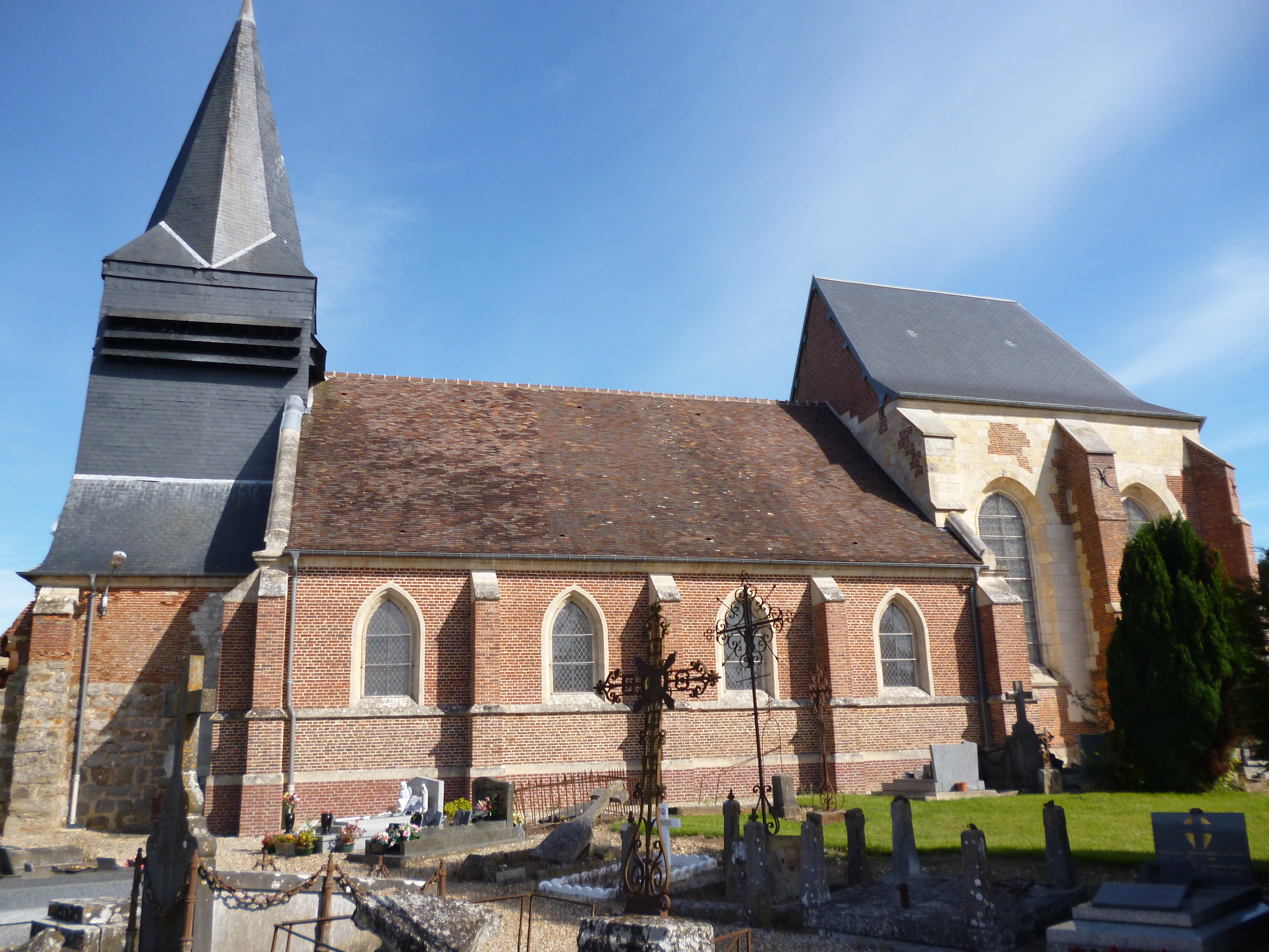 Commune de Welles-Pérennes (Oise).